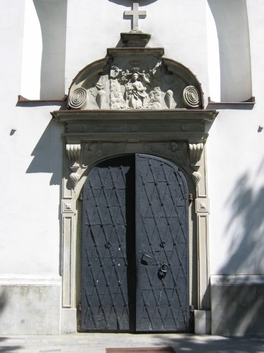 Kościół Stary w układzie urbanistycznym Białegostoku. Zabytkowy portal Starego Kościola Farnego w Białymstoku. Autor zdjącia Dariusz Witkowski. Zdjecie wykonane w 2006 r.